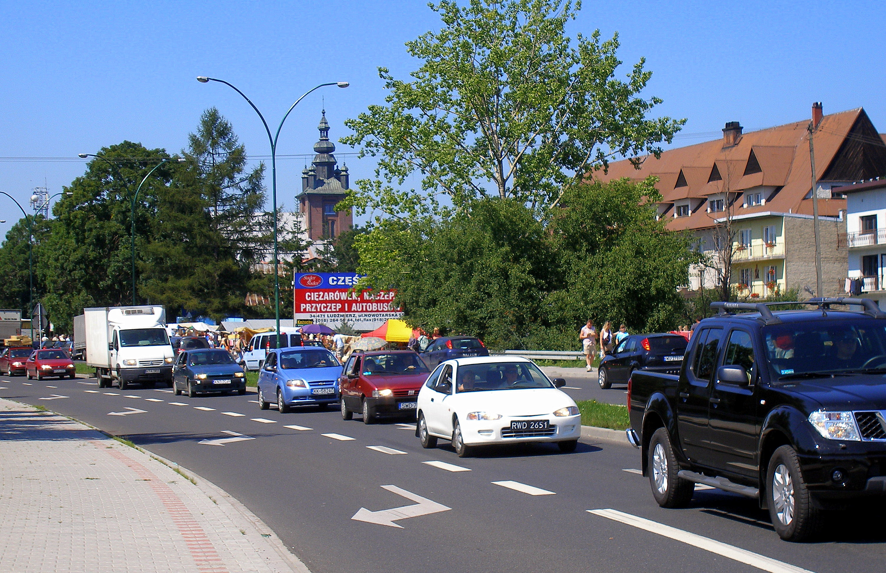 Slovákmi obľúbené juhopoľské mesto Nowy Targ.